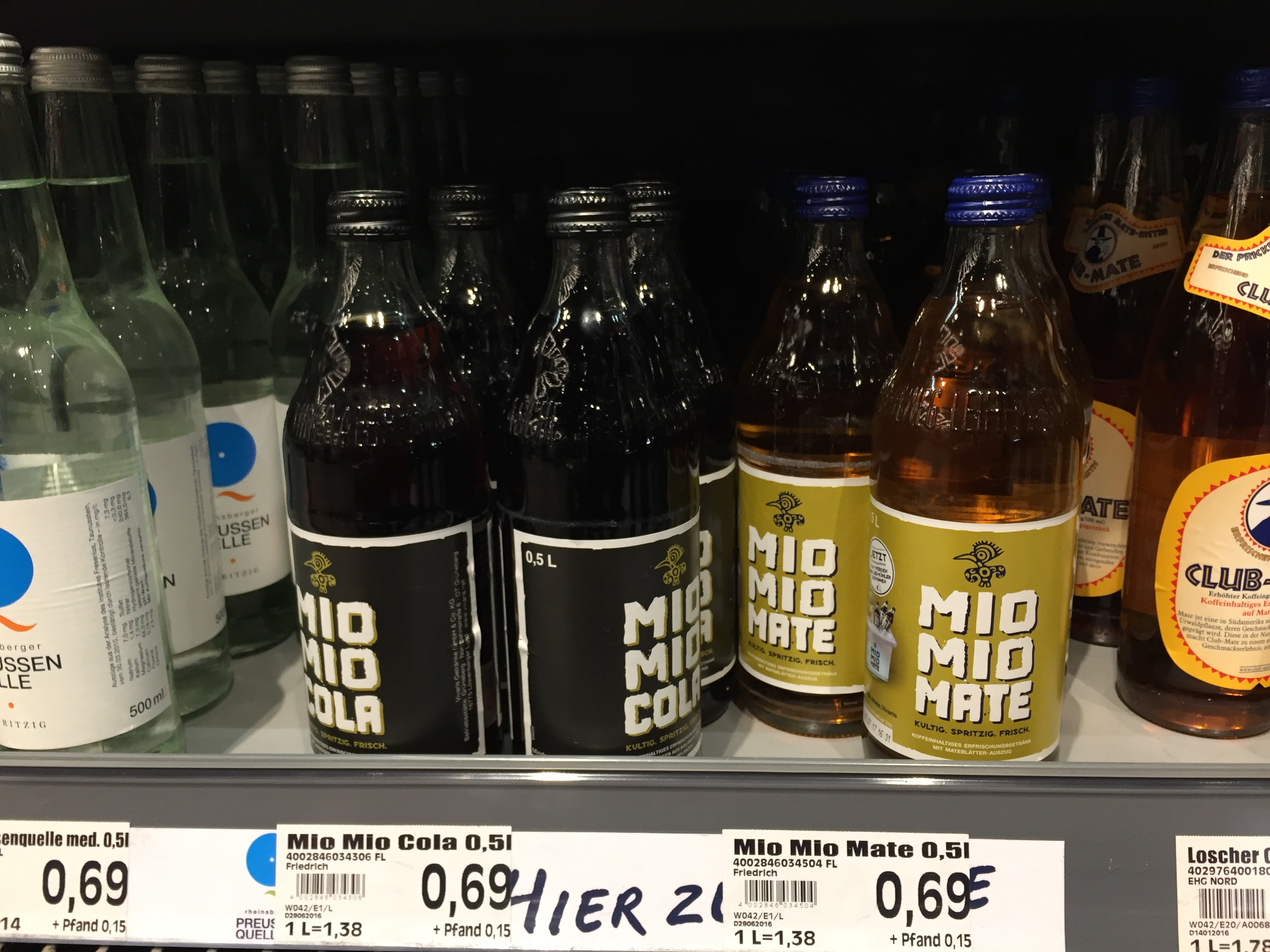 Mio Mio Cola & Mio Mio Mate in einem Supermarkt